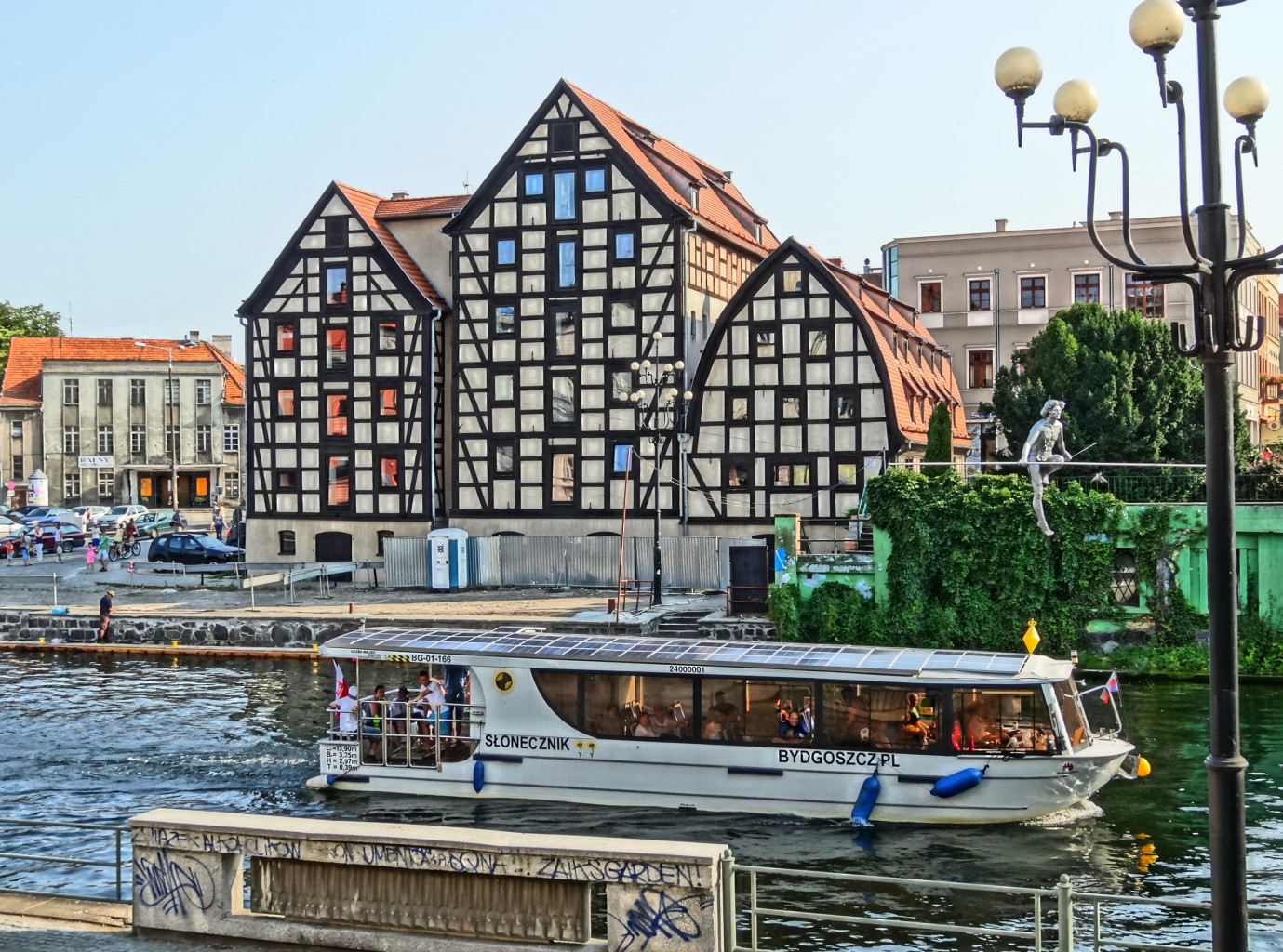 Spichrze nad Brdą w Bydgoszczy, zbud. w latach 1793-1800, od 1964 r. w gestii Muzeum Okręgowego